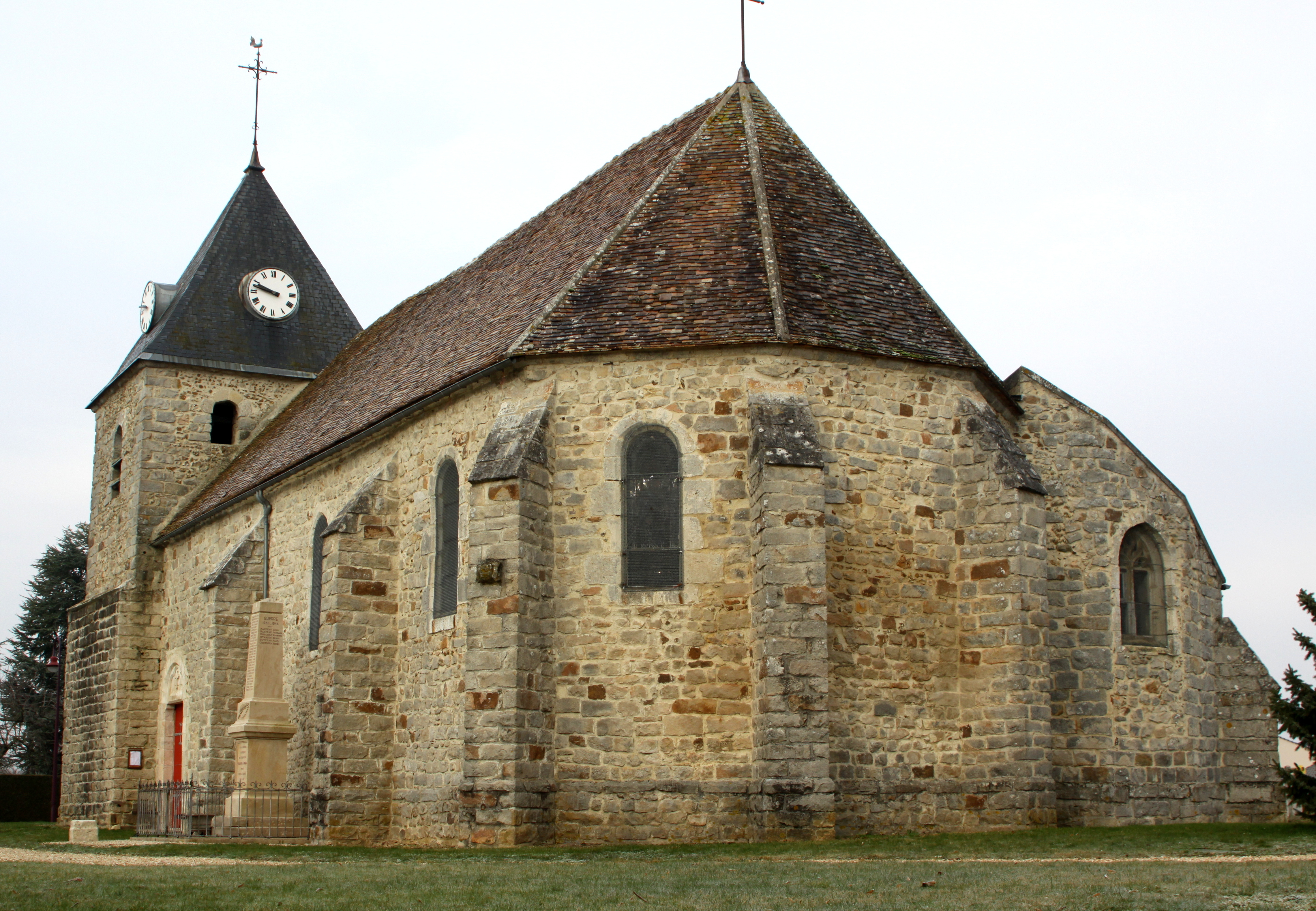 D'Kierch vu Villeneuve-la-Dondagre